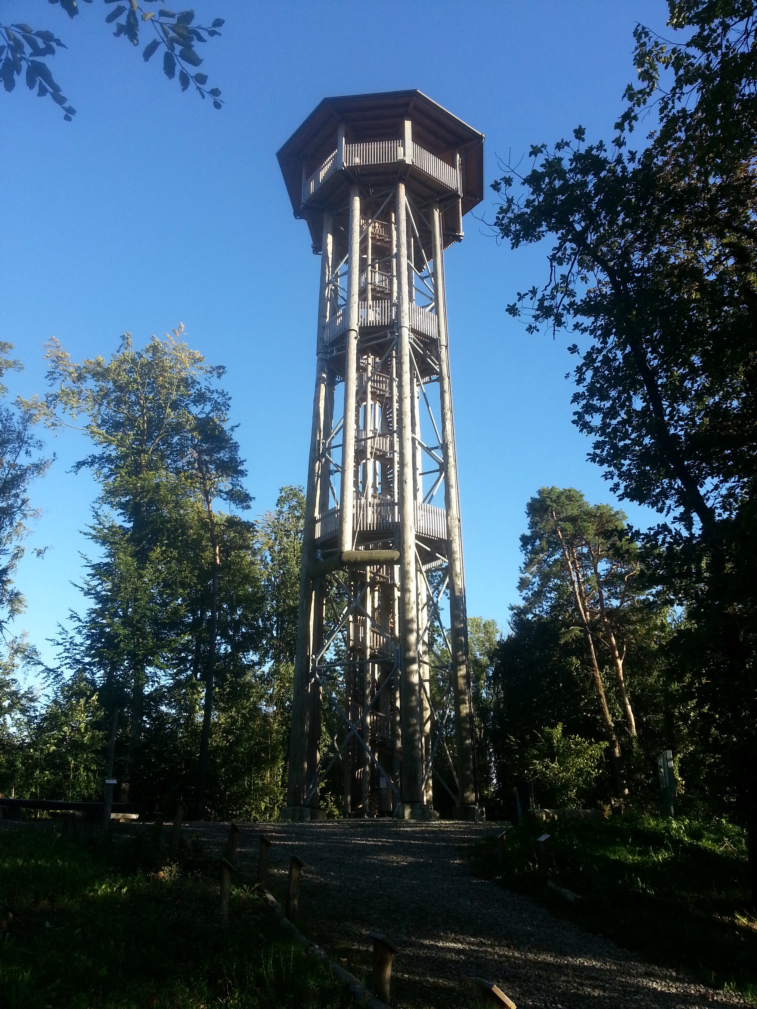 Hochwacht Wildensbuch